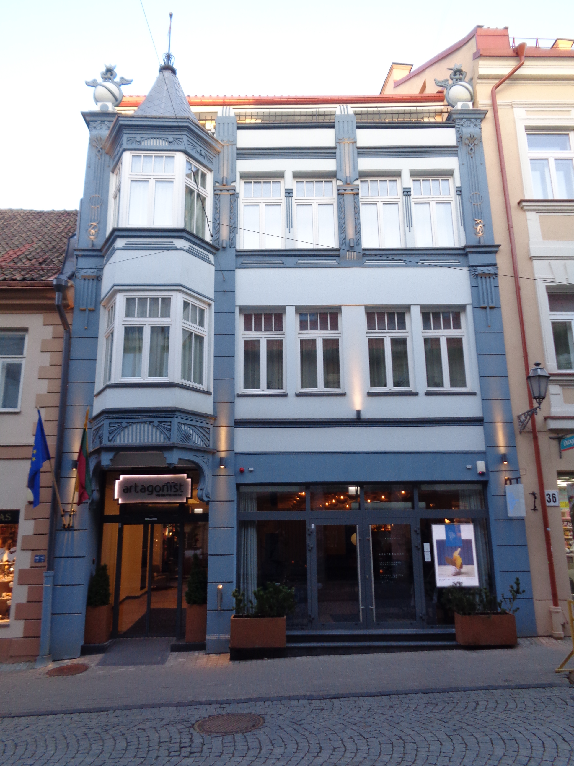 Дом Феликса Завадского в стиле модерн на улице Пилес 34 (Вильнюс). Проект Владислава Стипулковского (1907)